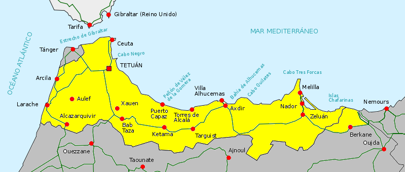 A pocos kilómetros de Alhucemas se encuentra la ciudad de Axdir/Ajdir patria de Abdelkrim